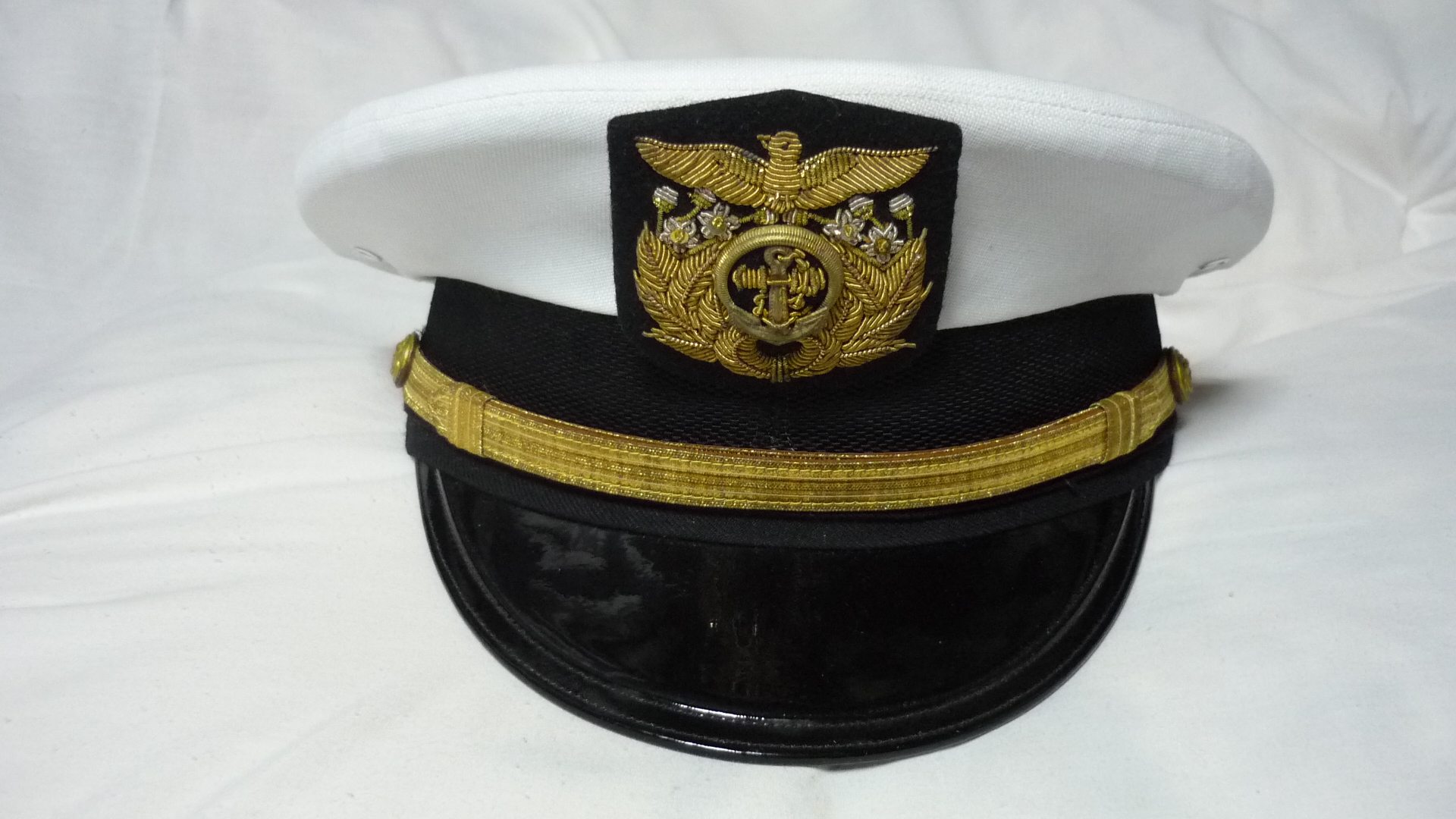 警備隊から海上自衛隊1970年までの幹部正帽